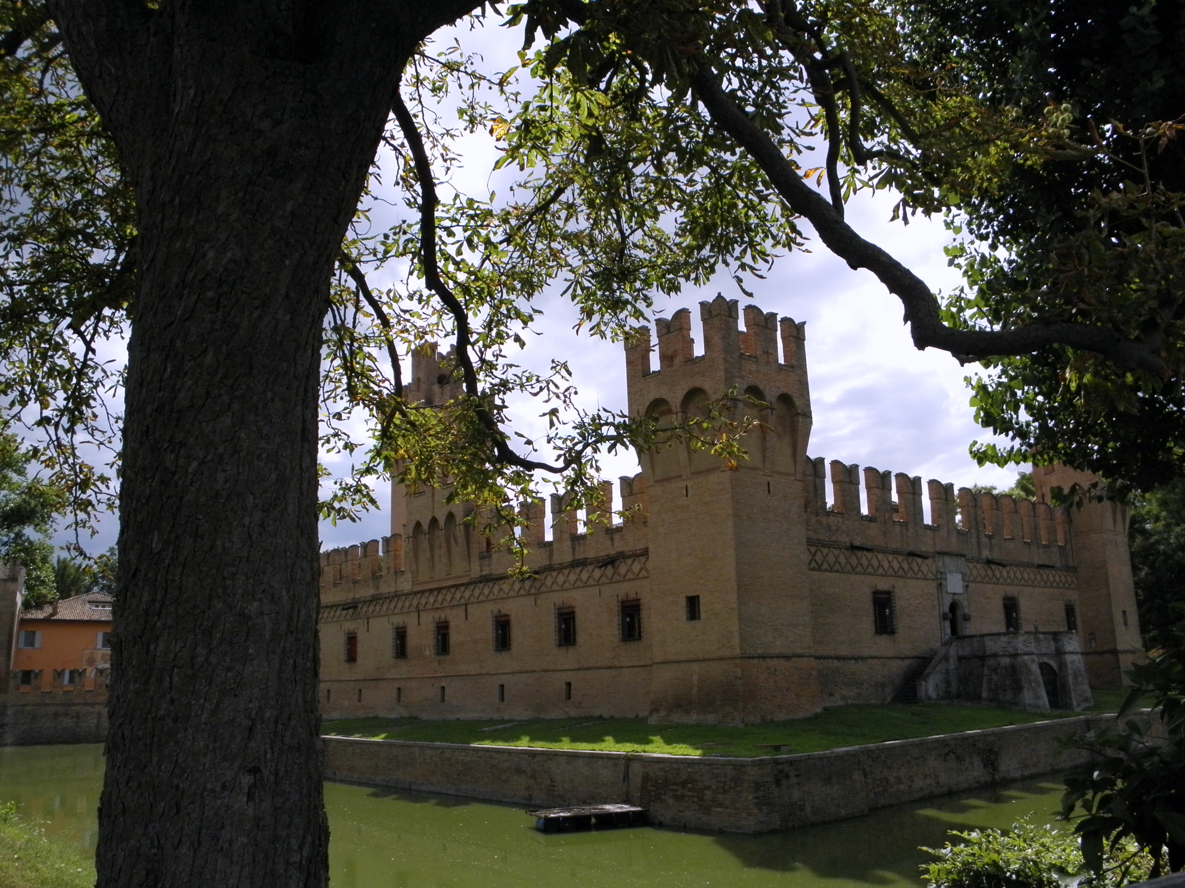 San Martino in Soverzano, frazione di Minerbio: il Castello di San Martino in Soverzano detto anche “dei Manzoli”.